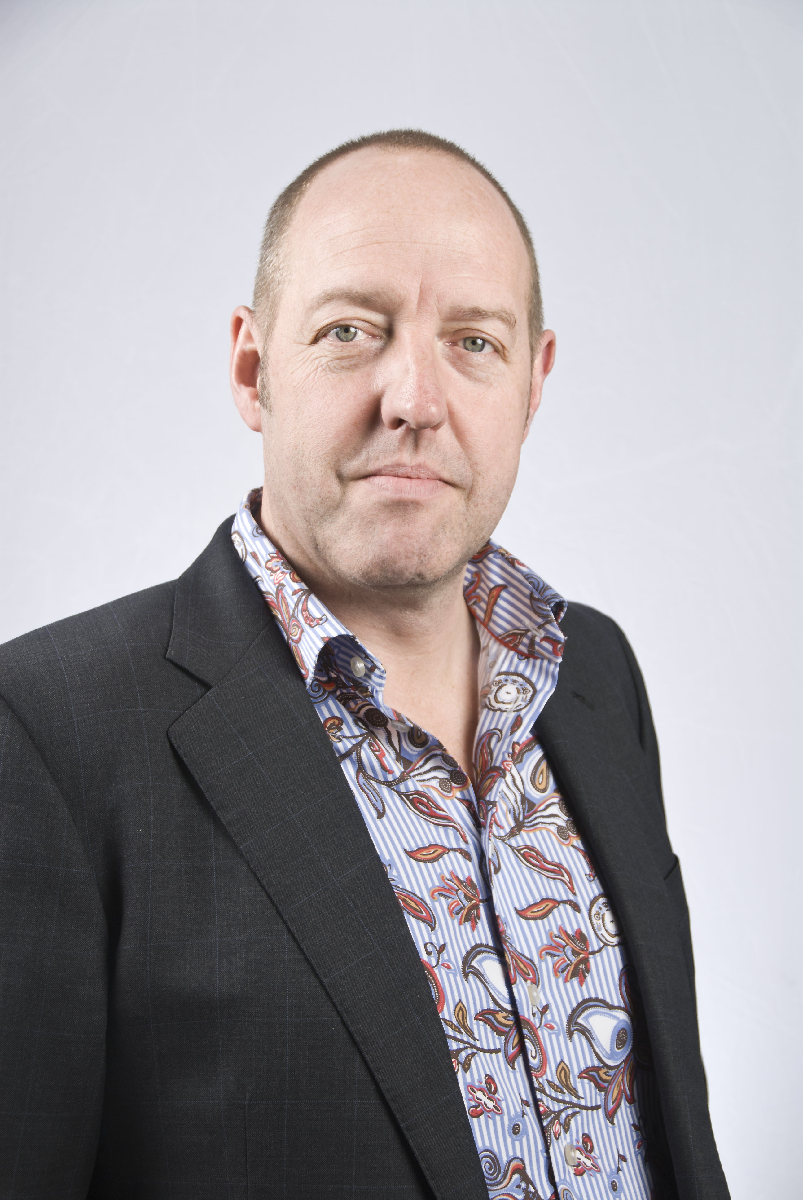 Nederlands acteur, bekend van de AH-reclame op tv. Foto gemaakt op de stand van Lediy Studio & Agency tijdens de Beta Bedrijvendagen in Het Kasteel te Groningen